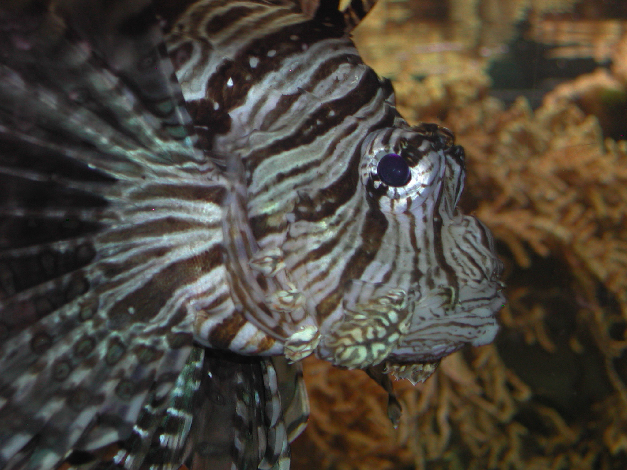 Pazifische Rotfeuerfisch (Pterois volitans) Photo taken in the Tierpark Dählhölzli in Berne Source: photo uploaded by User:RicciSpeziari. Photographer: Riccardo Speziari